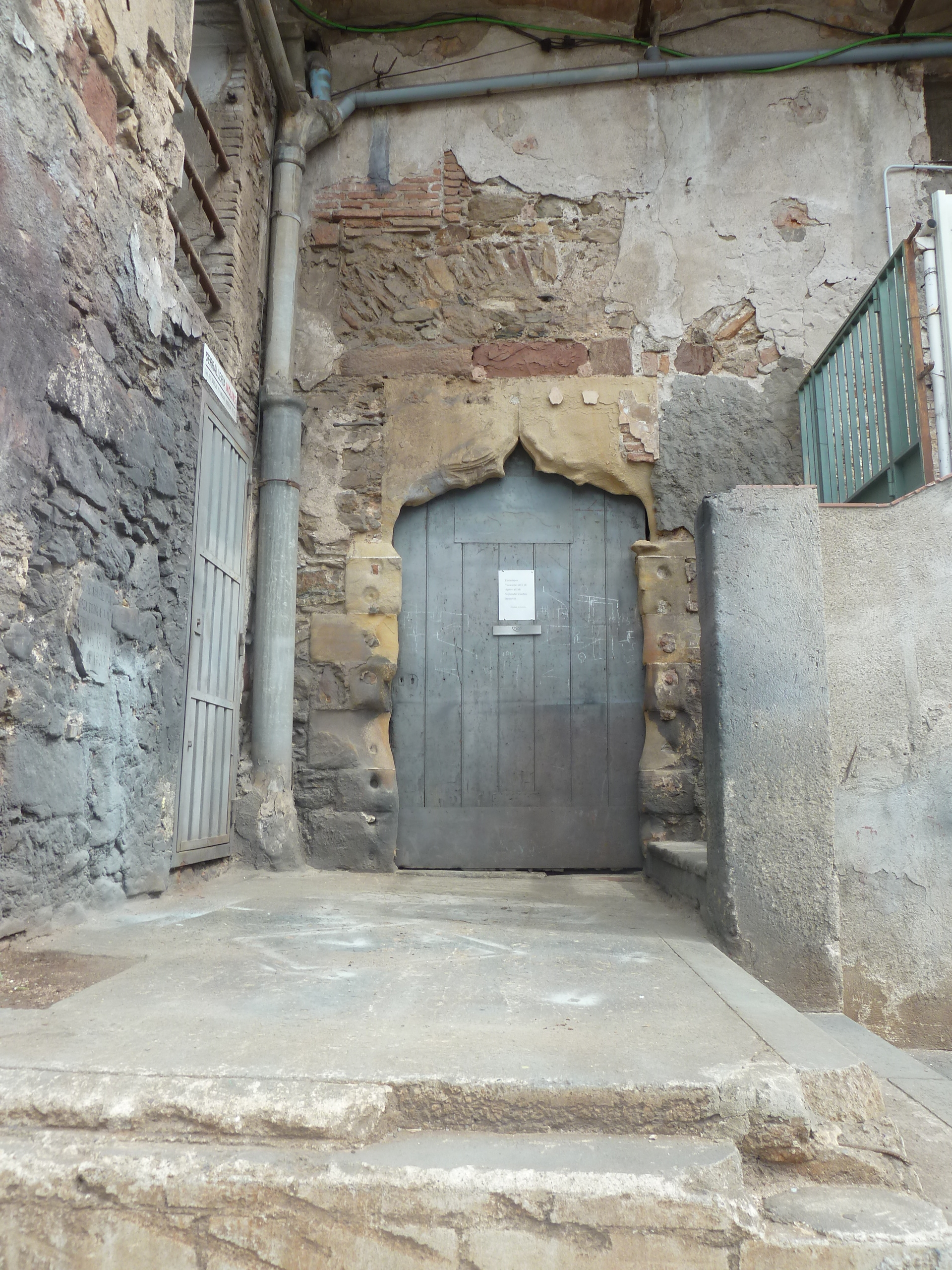 Palau dels Requesens (Molins de Rei)